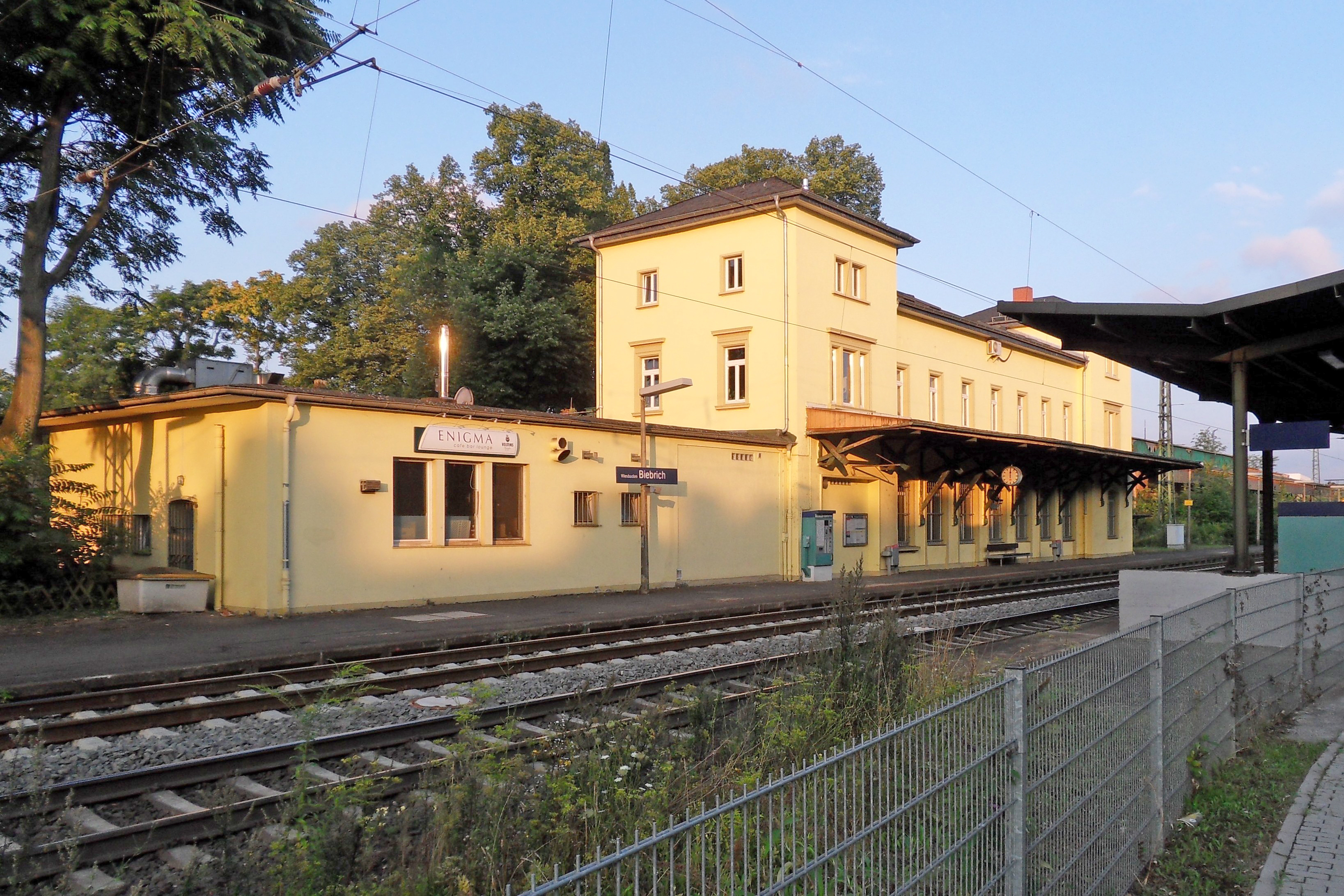 Bahnhof Wiesbaden-Biebrich an der Rechten Rheinstrecke, Blick von Nordosten. Das Gebäude ist in privaten Händen